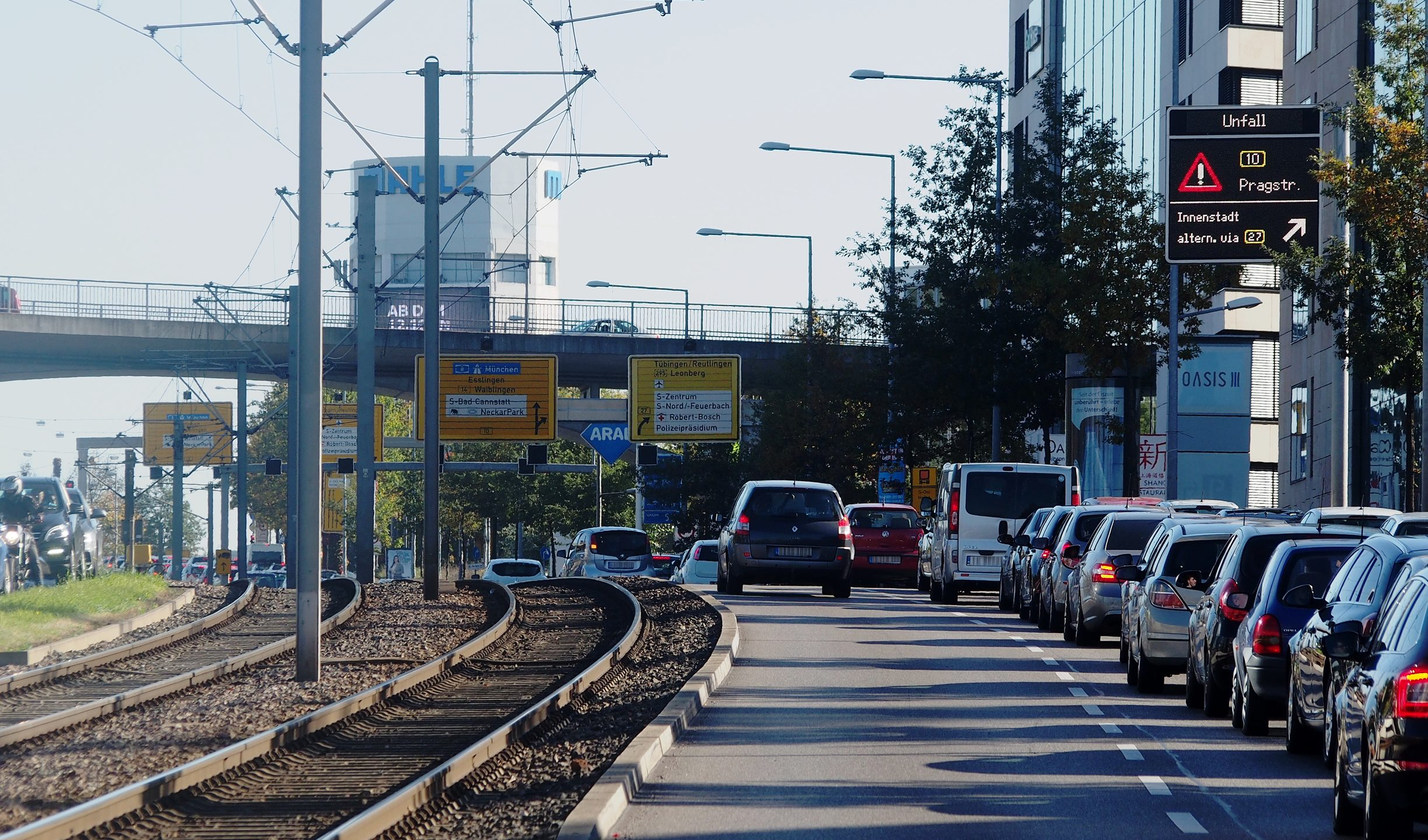 Wechselwegweiser auf dem Pragsattel. Aktuell wird ein Unfall auf der Pragstraße angezeigt. Diese ist nicht ganz gesperrt, es wird aber vorgeschlagen, sie zu umfahren.